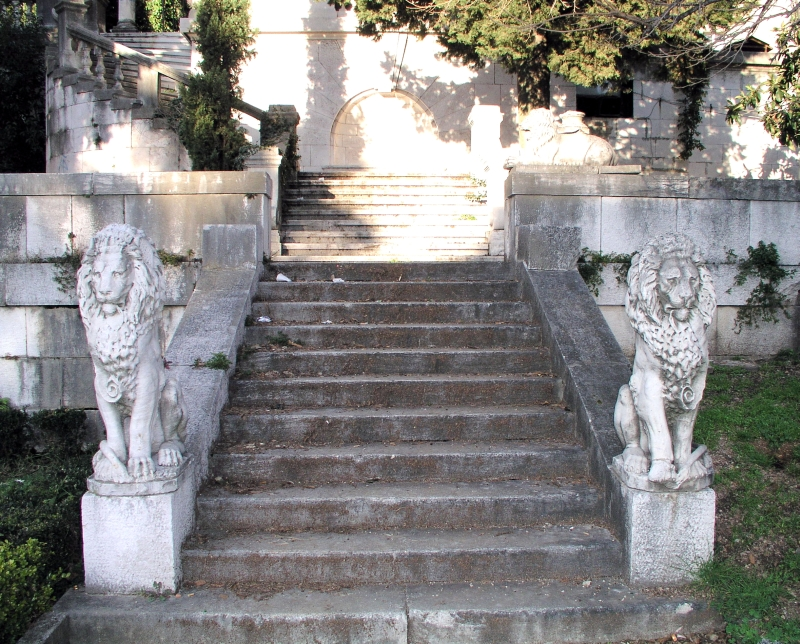 park Pomorskog i povijesnog muzeja Hrvatskog primorja u Rijeci, Hrvatska